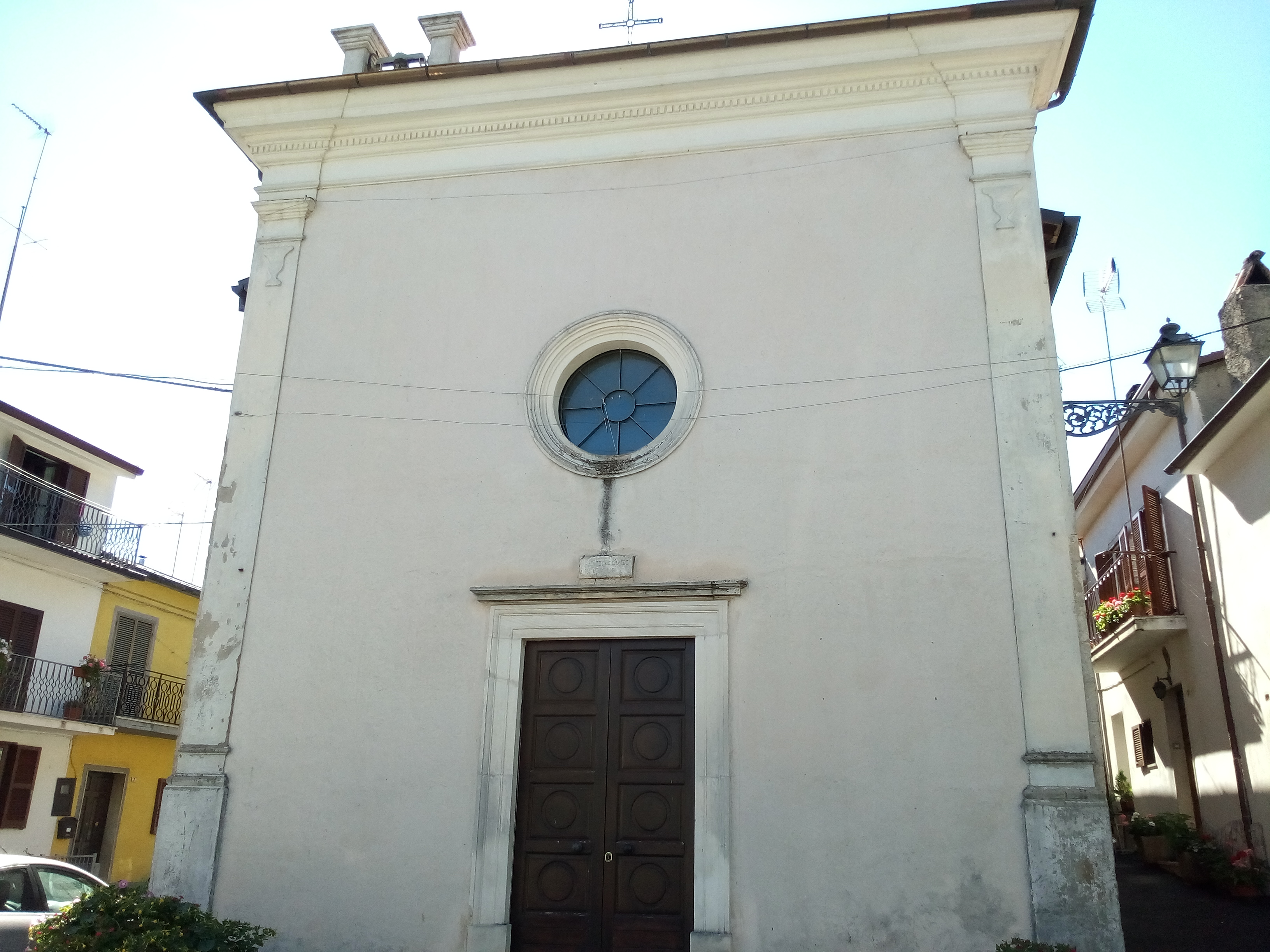 Chiesa di San Rocco, Collelongo, Abruzzo